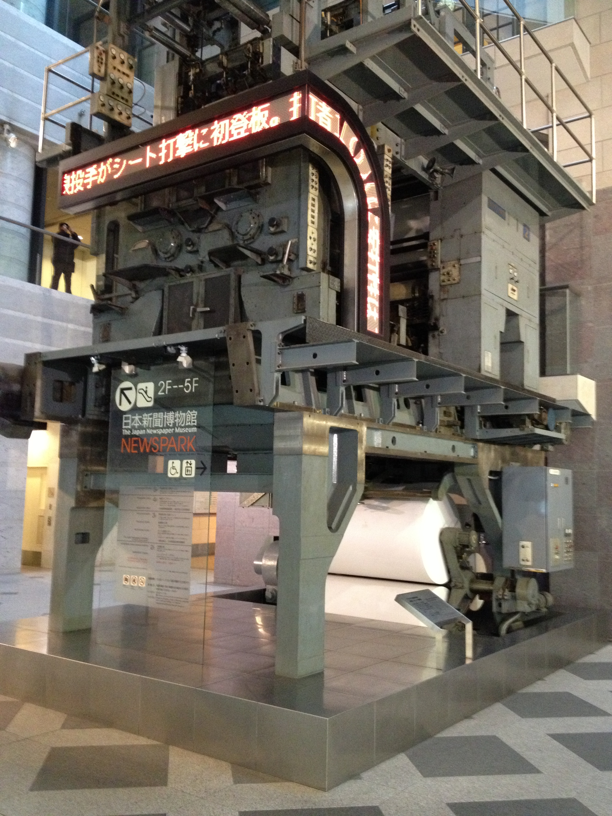 初期の新聞オフセット輪転機。1979年（昭和54年）に静岡新聞社に納入され、1997年（平成9年）まで使用された。日本新聞博物館蔵。